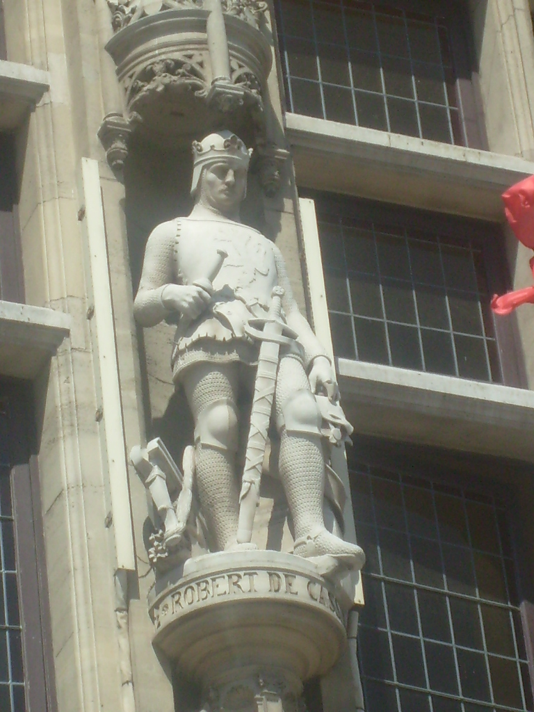 Statue de Robert de Cassel sur la façade de l'hôtel de ville de Dunkerque